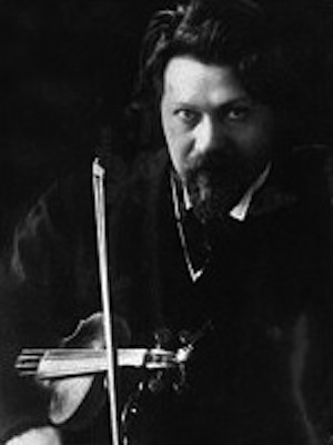 Михаил Исаакович Пресс (1871-1938)